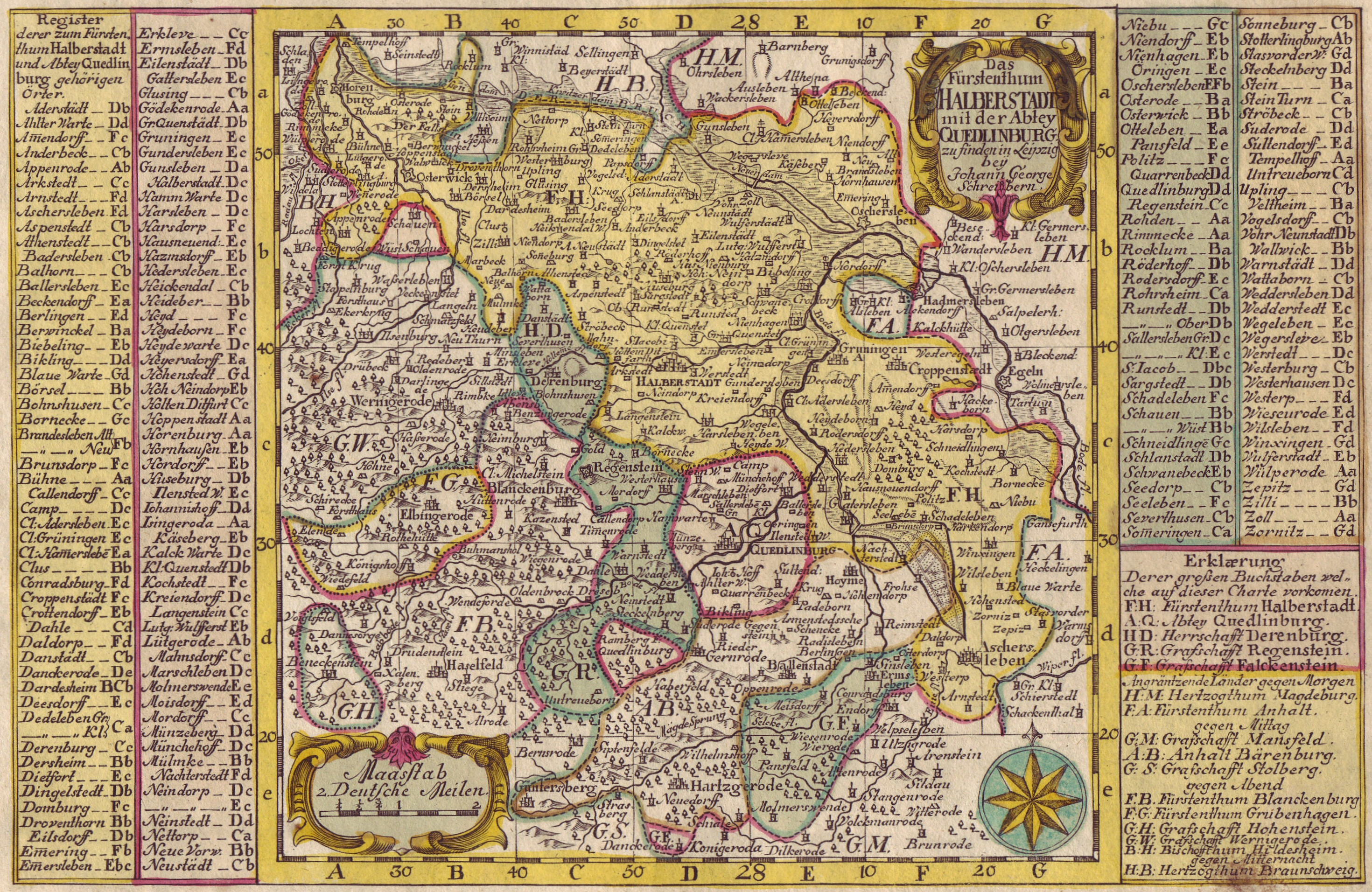 Landkarte 1750 von Johann George Schreiber - eigener Besitz